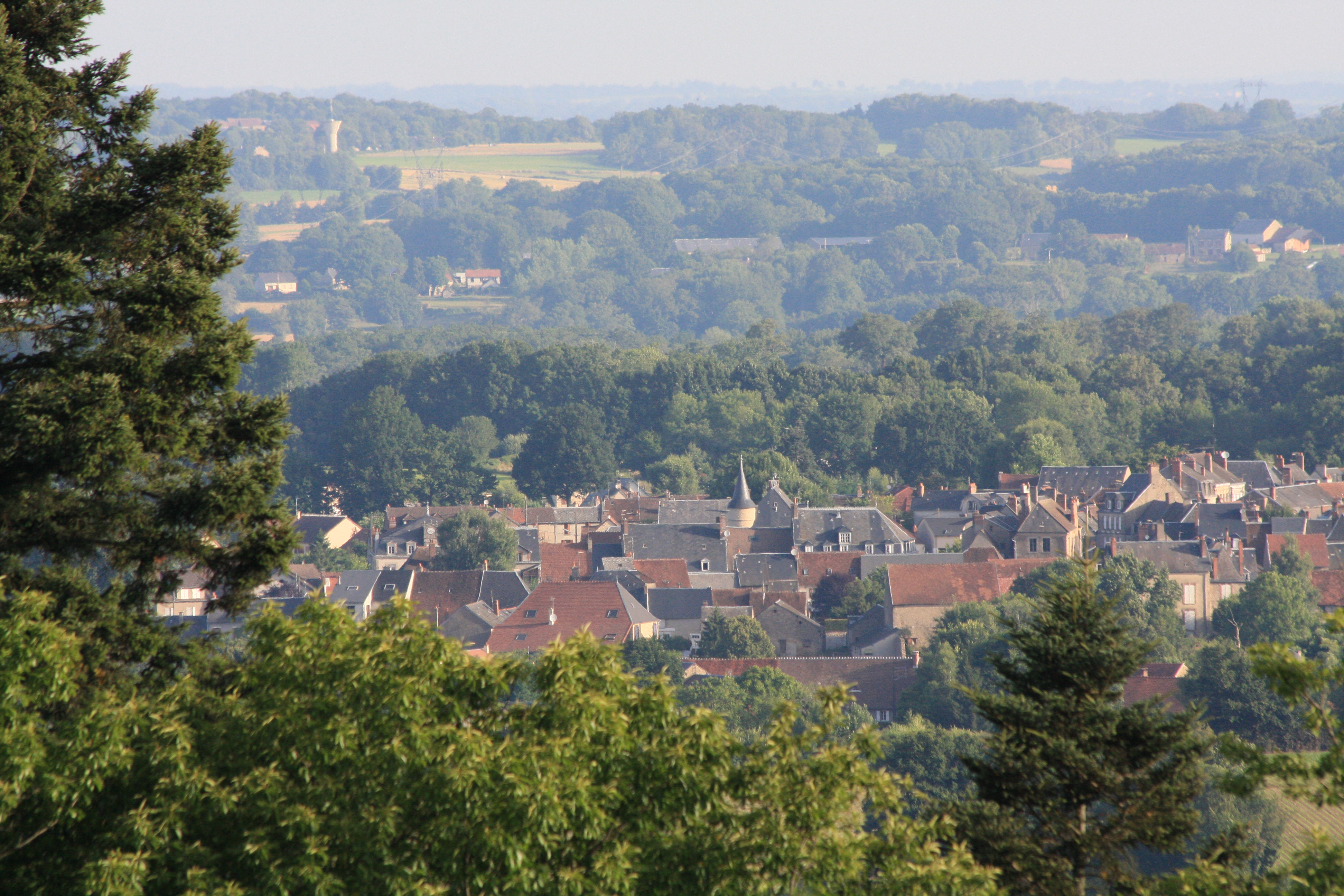 Dun-Le-Palestel vu depuis le bois de Chabannes.